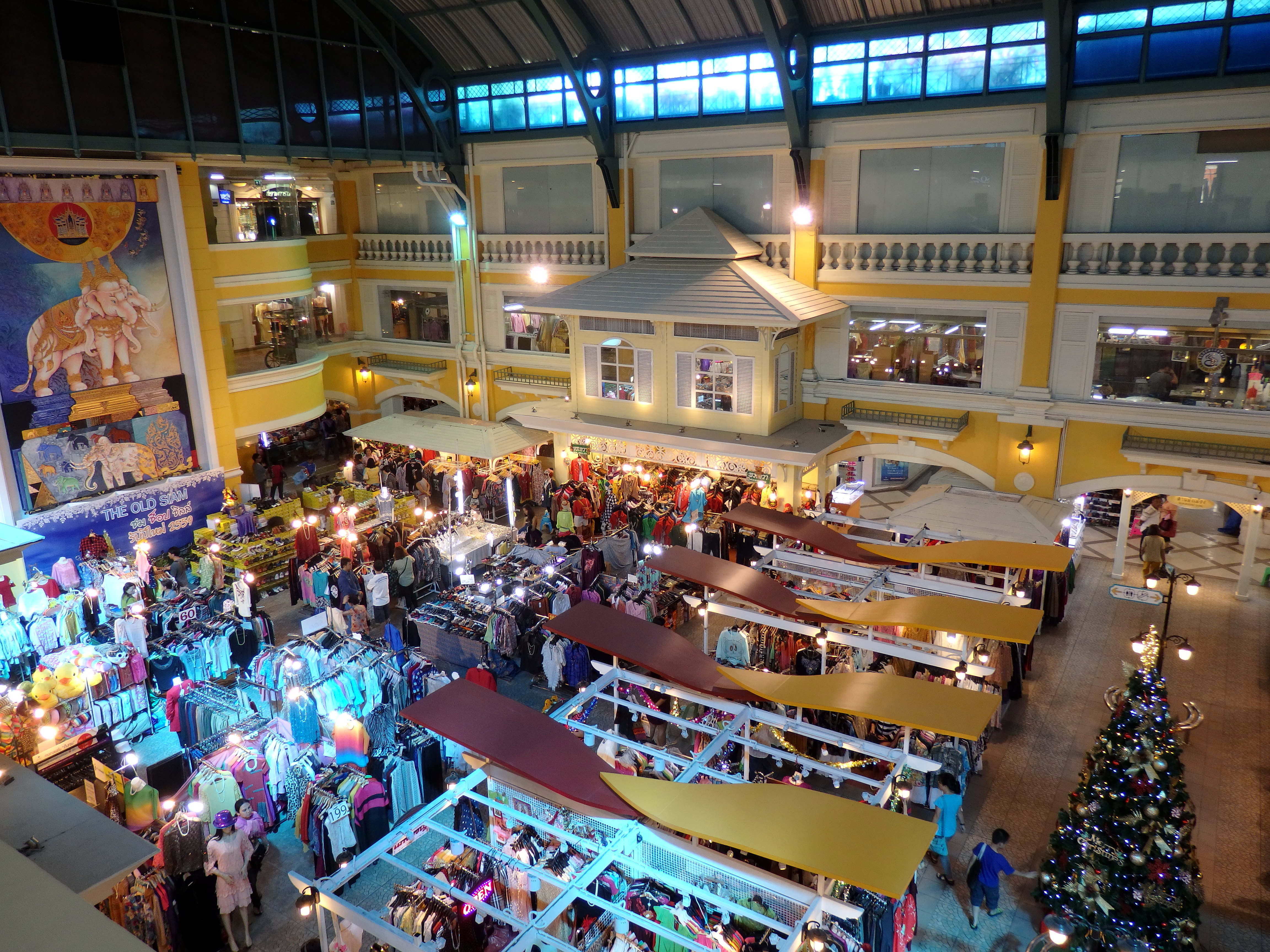 Wang Burapha Phirom, Phra Nakhon, Bangkok, Thailand